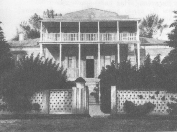 The birthplace of Mikhail Saltykov -Shchedrin ( precisely in the village of Spas - angle). Watercolor D. Afanasyev beginning of the 1900s